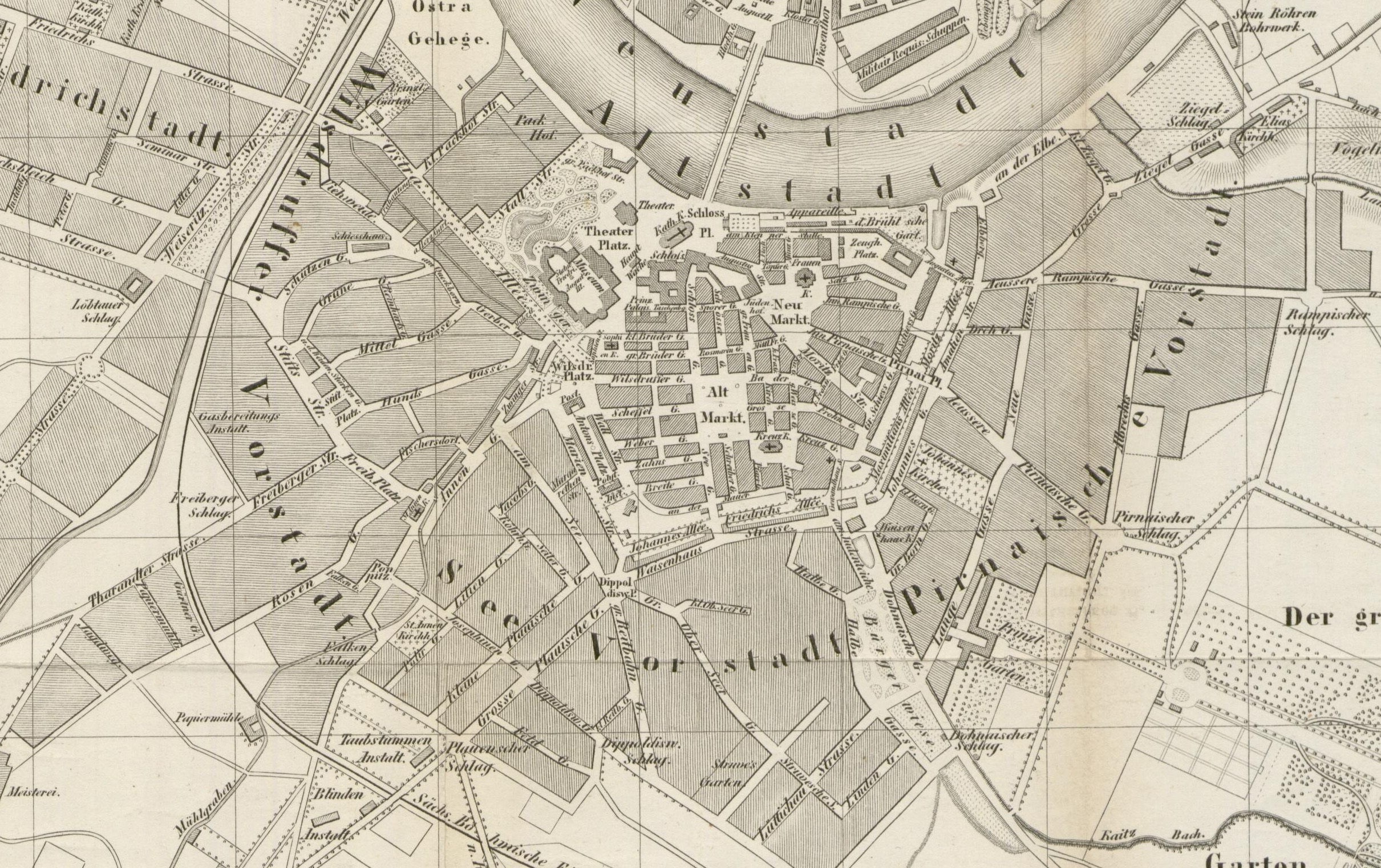 Plan von Dresden 1849 Ellezinguer Gottschalck (Ausschnitt)